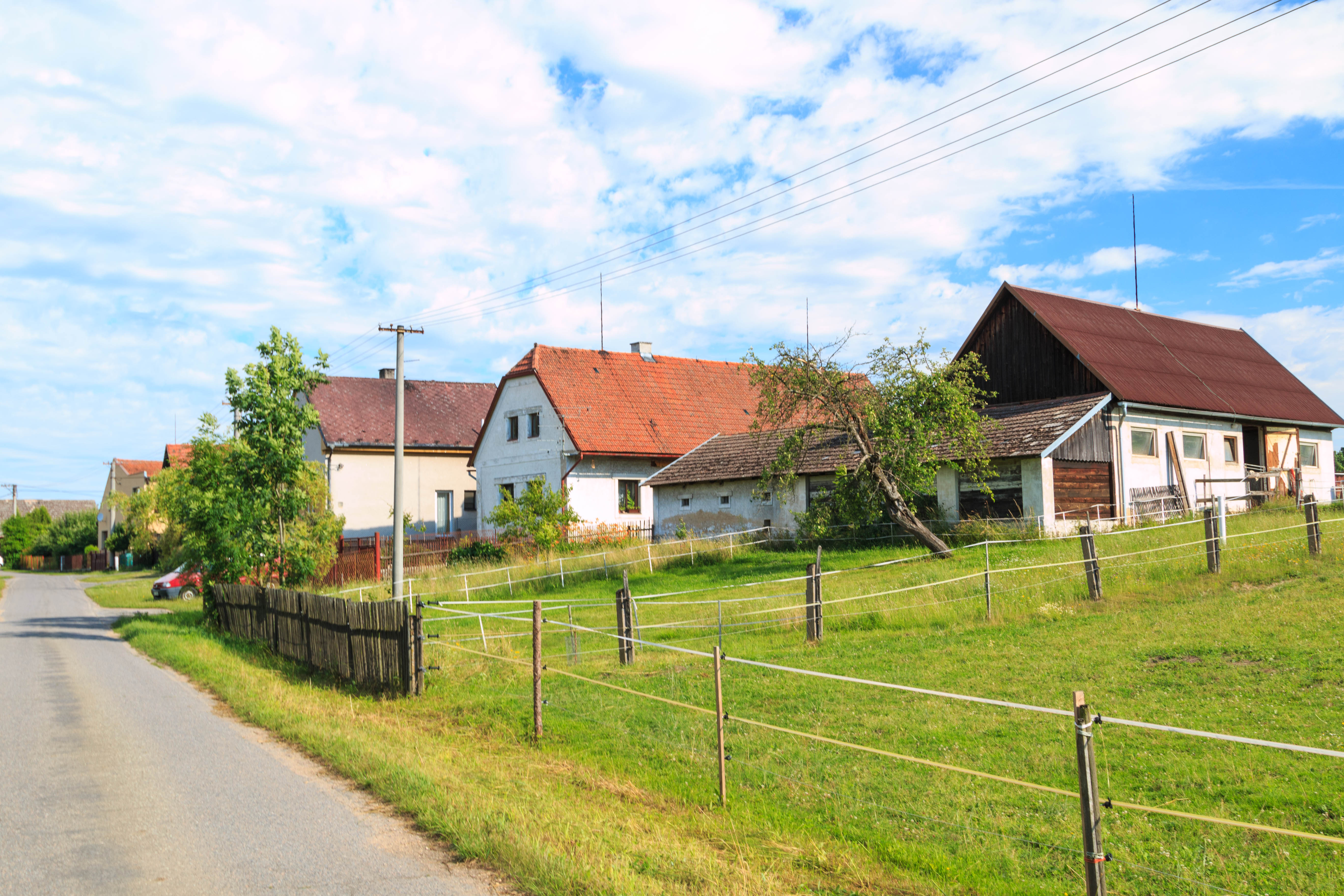 Prochody č. 1